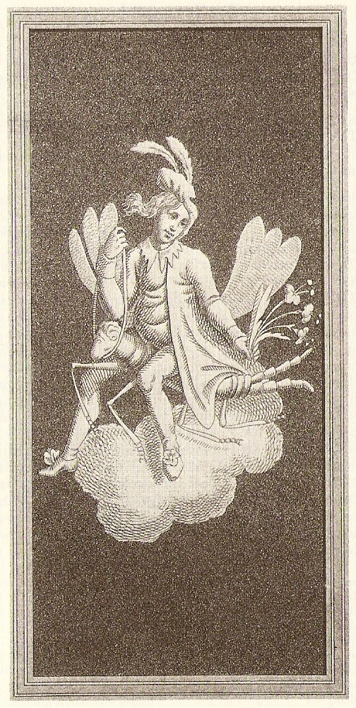 Der Zauberer Prosper Alpanus auf einer Libelle. Kupferstich von Carl Friedrich Thiele (1780-1836) für den Umschlag der Erstausgabe von "Klein Zaches genannt Zinnober" von E.T.A. Hoffmann nach einer Zeichnung Hoffmanns.